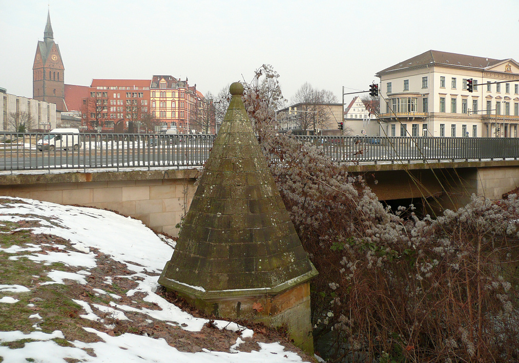 Sielturm der Stadtbefestigung Hannover